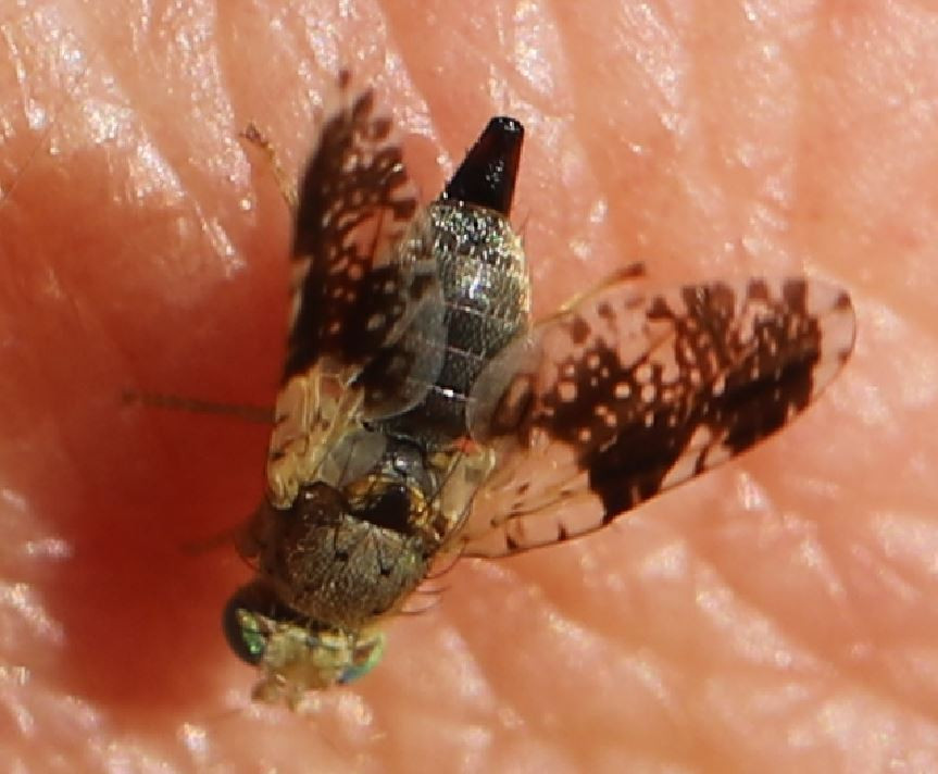 Bohrfliege Tephritis formosa am 23. Juni 2020 an der Côte d’Azur